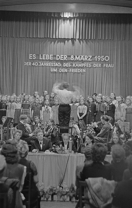 Original image description from the Deutsche Fotothek Kinderorchester